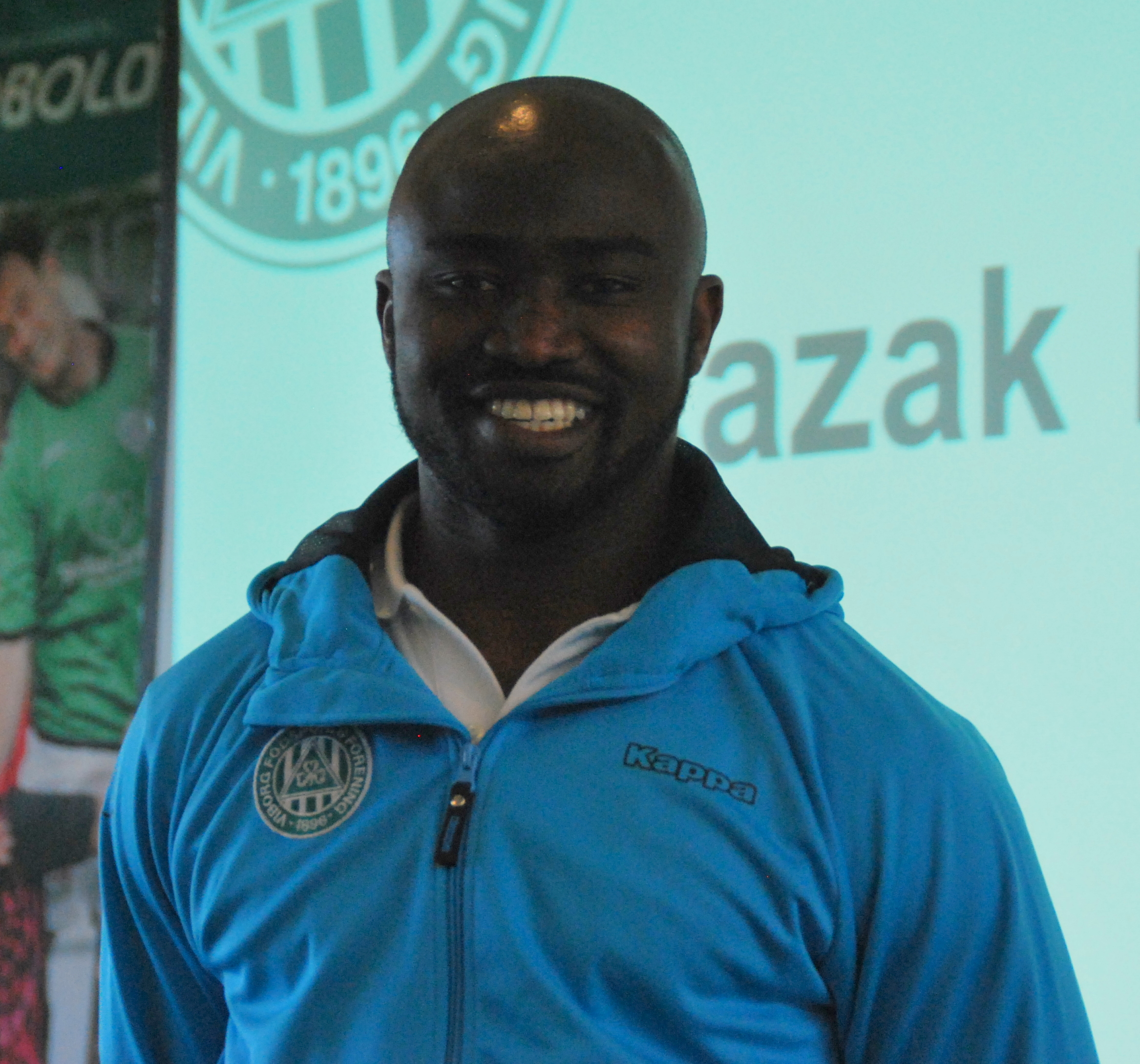 Fodboldspilleren Razak Pimpong fra Viborg FF. Her ved præsentation af spillertruppen for foråret 2012.